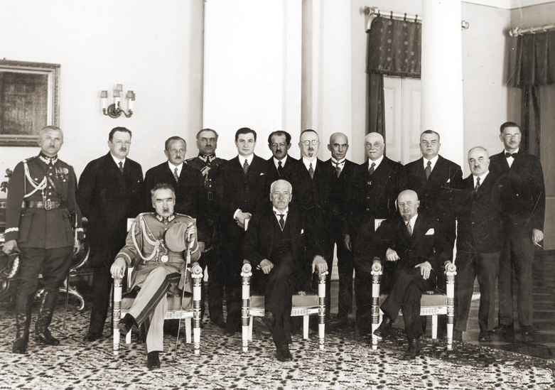 Polish Government under Prime Minister Aleksander Prystor